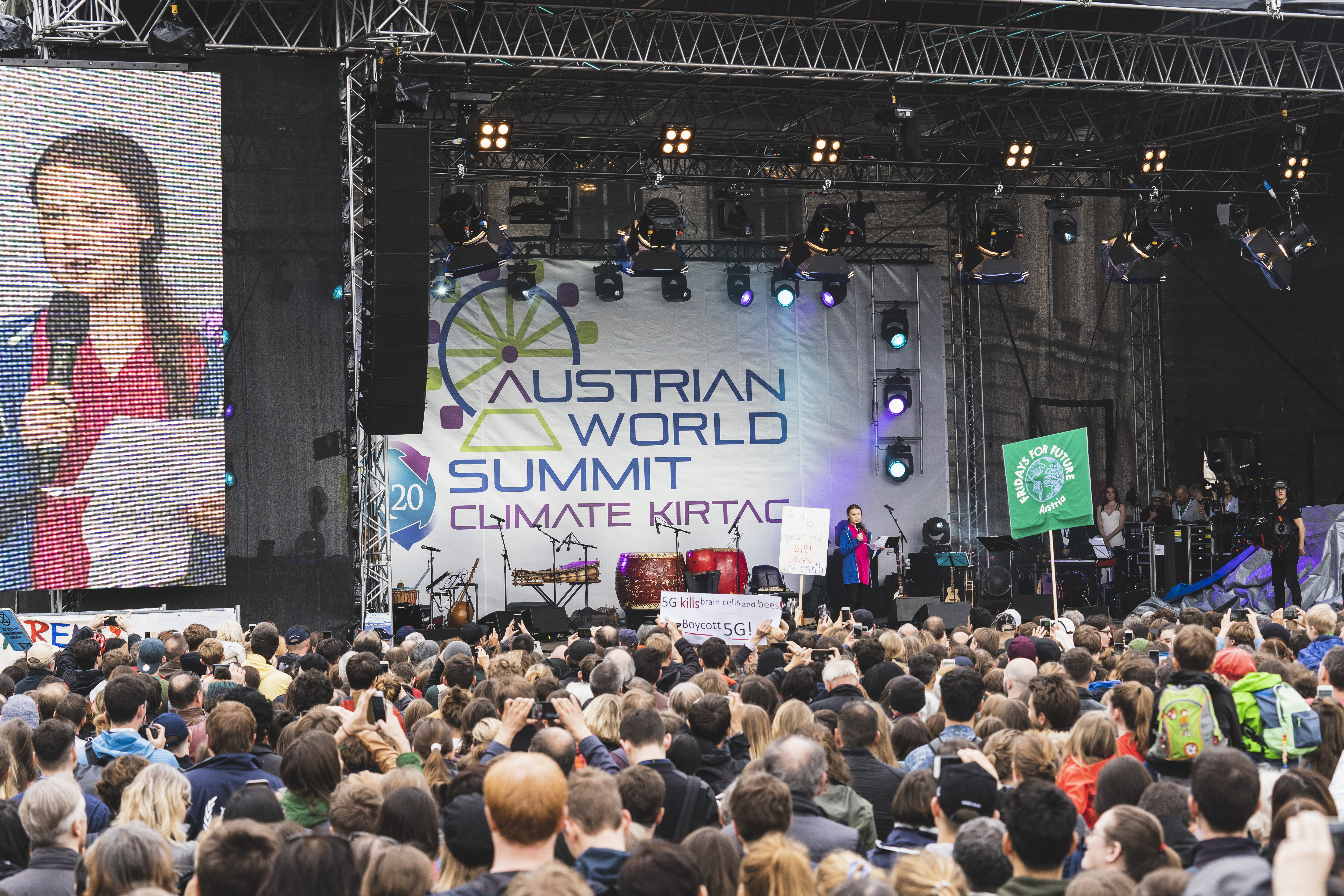 Austrian World Summit Climate Kirtag zum Anlass des R20 Austrian World Summit mit Klimaaktivistin Greta Thunberg und R20 Gründer Arnold Schwarzenegger, Ihre Botschaft: We need more Action! Am 28. Mai 2019, Wien Copyright: Eugénie Berger